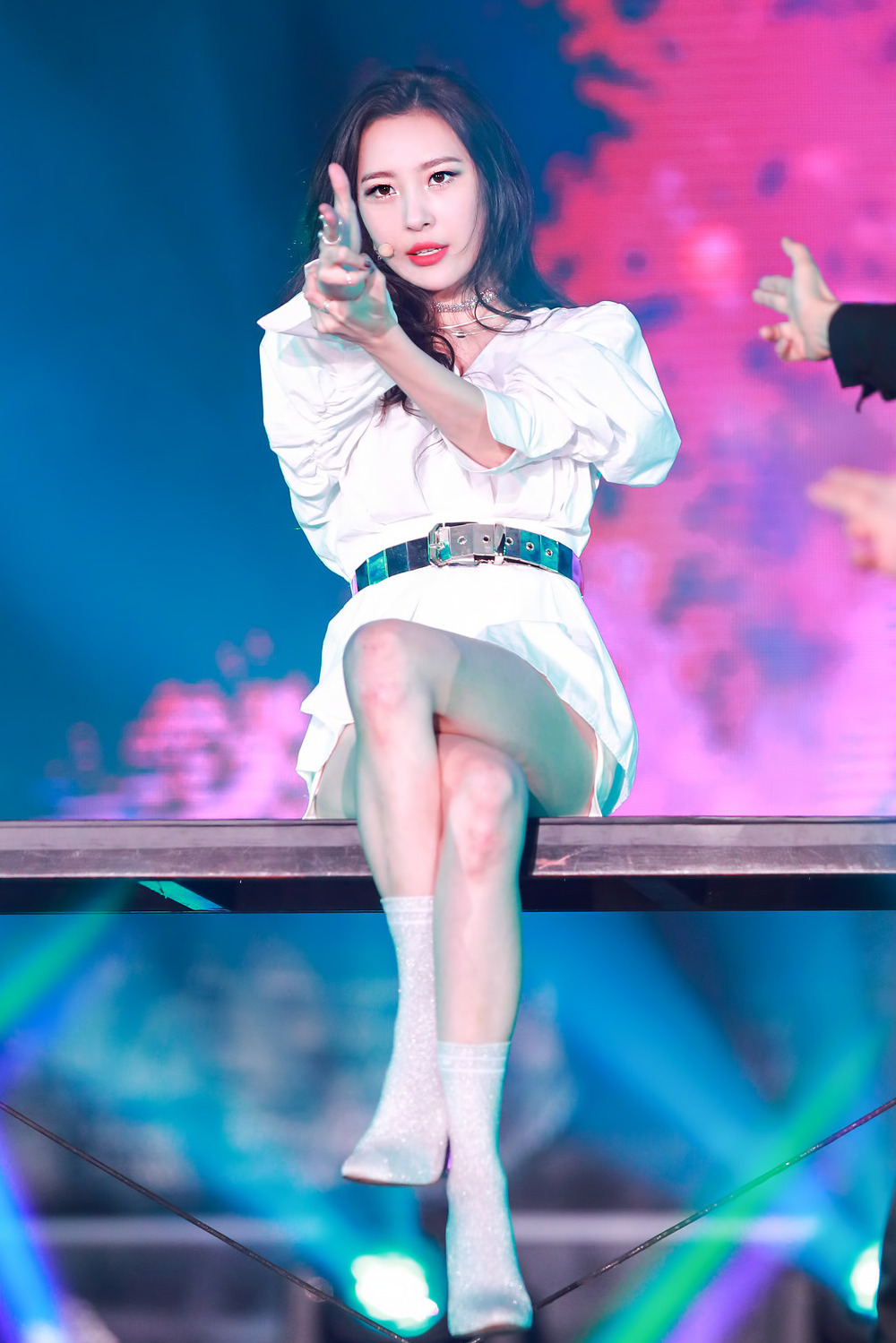 171001 코리아 뮤직 페스티벌 선미